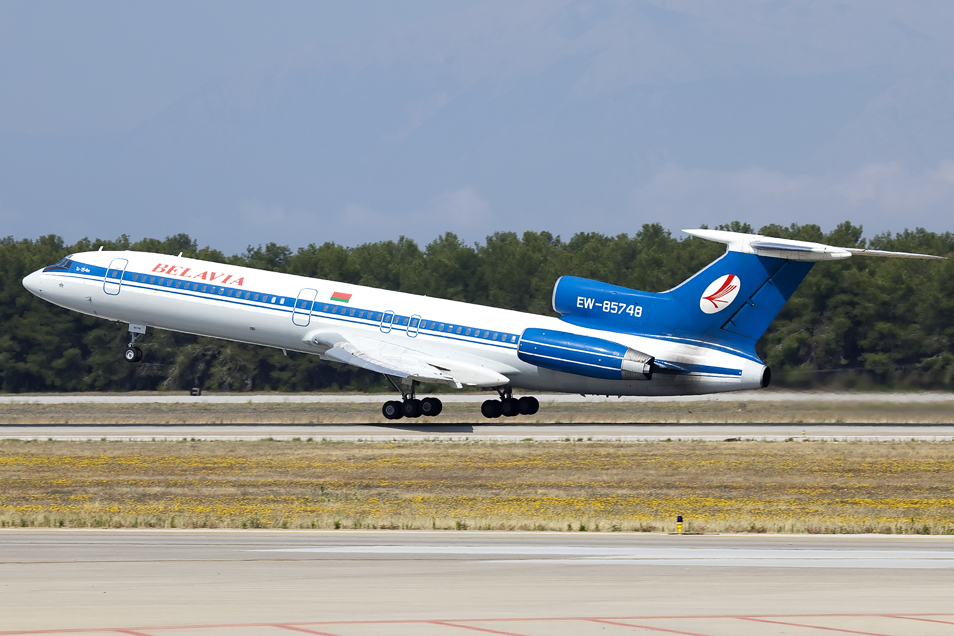 Antalya